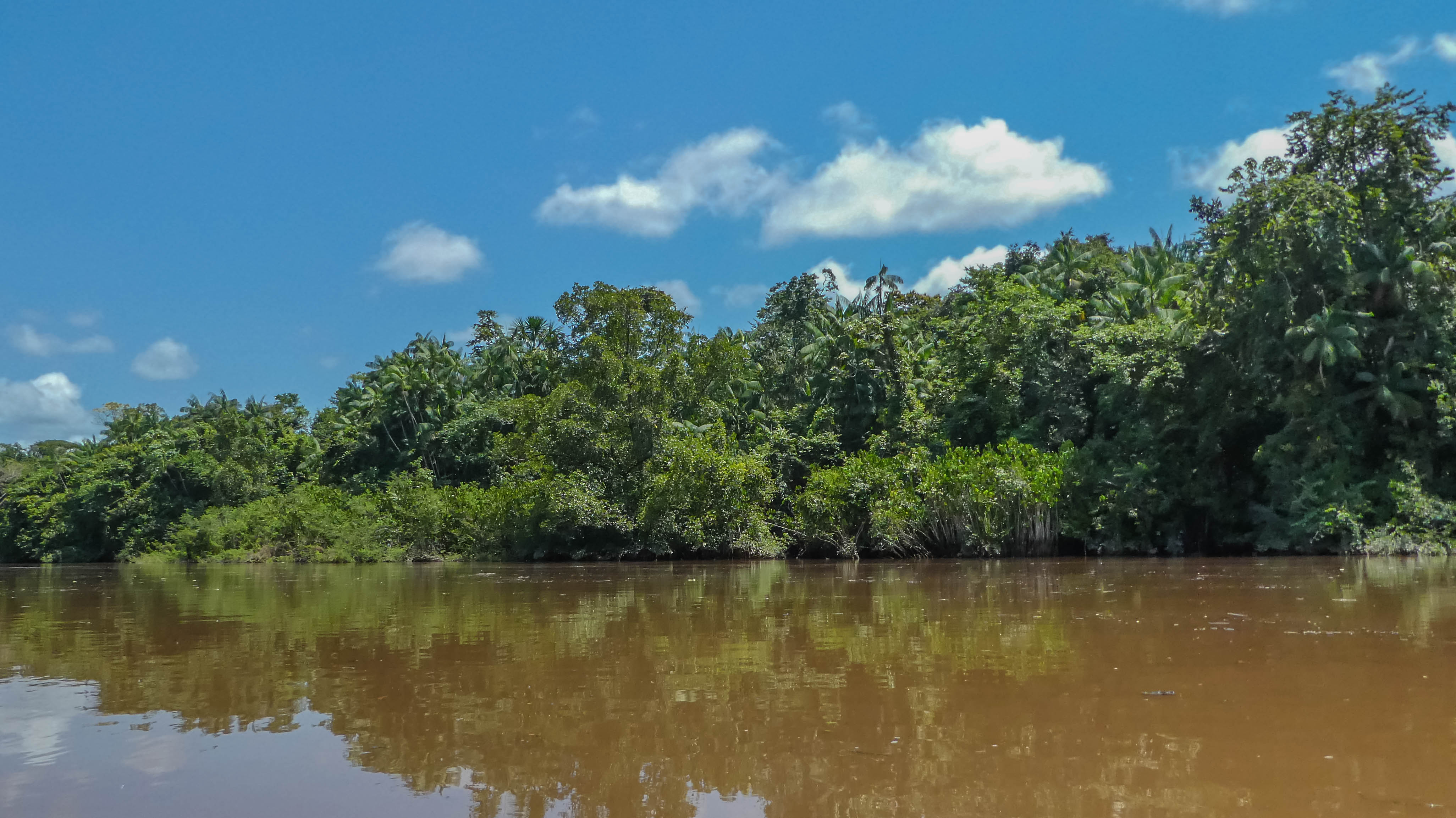 Commewijne river